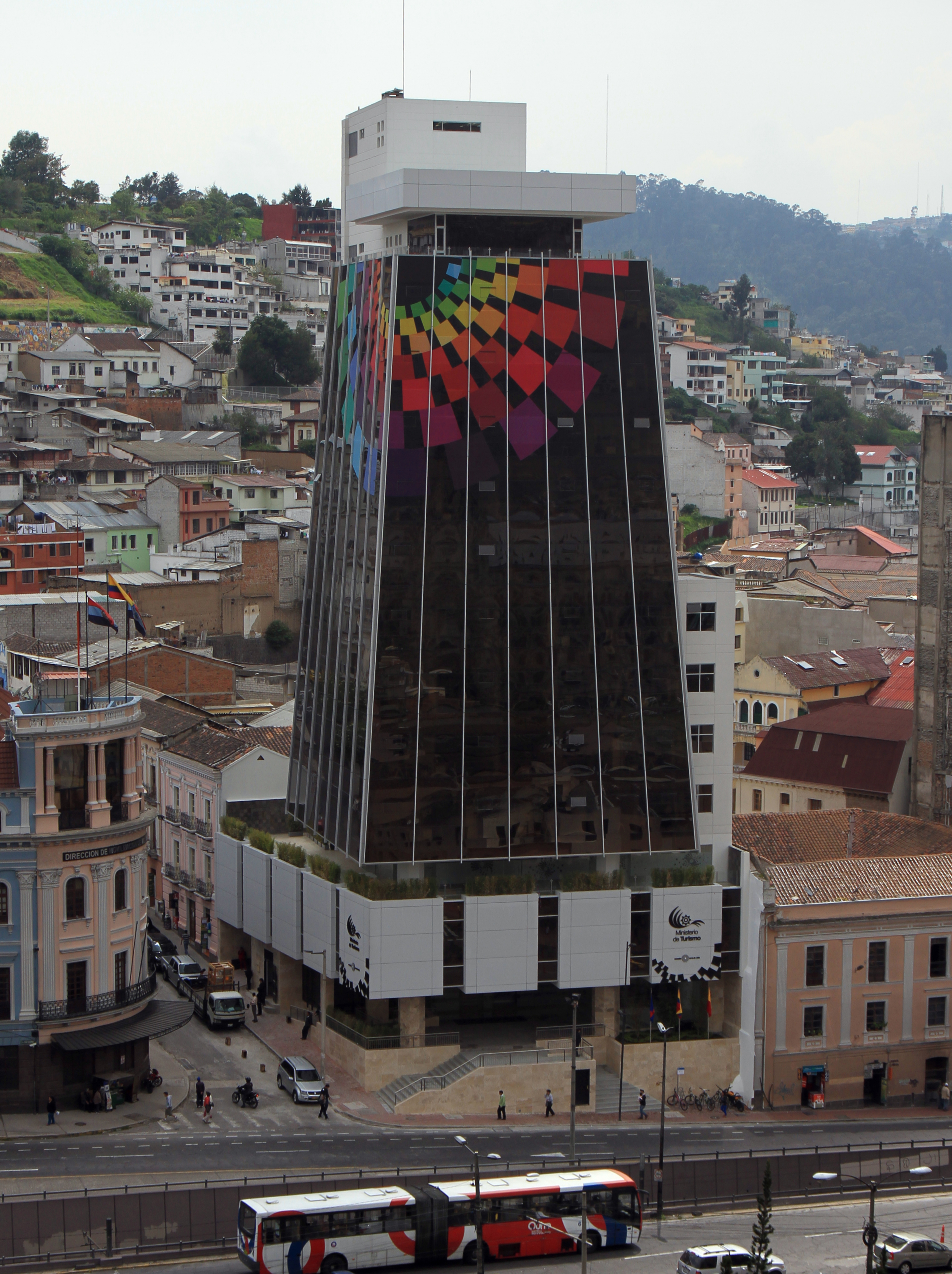 Antiguo edificio del Filanbanco, actualmente ocupado por el Ministerio de Turismo. Conocido como La Licuadora